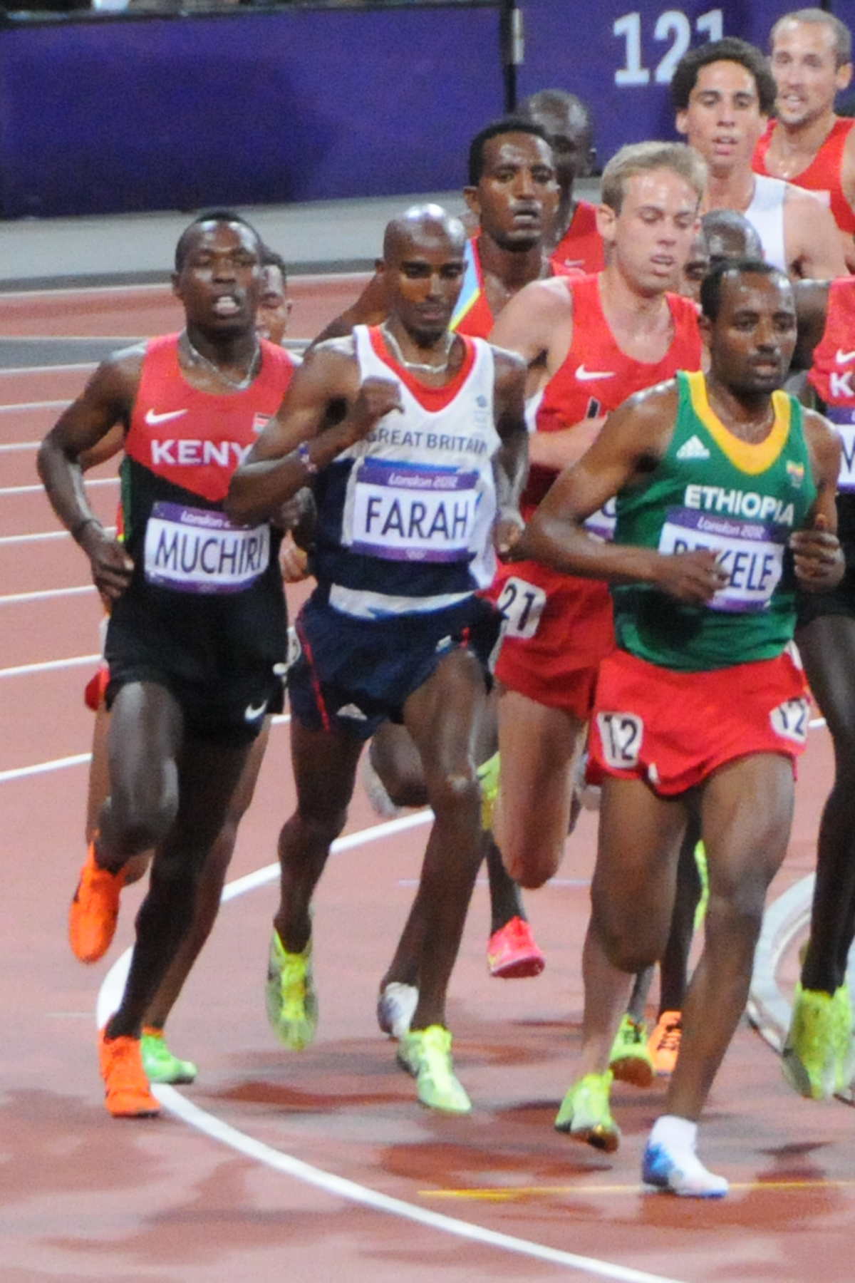 Course du 10000 m au stade olympique de Londres, Bedan Karoki Muchiri, Mo Farah, Galen Rupp, Tariku Bekele